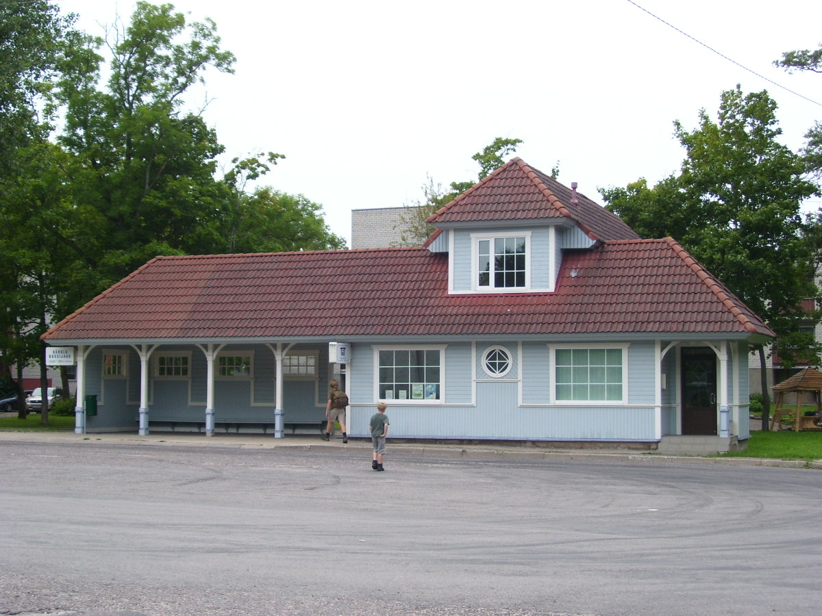 Kärdla bussijaam